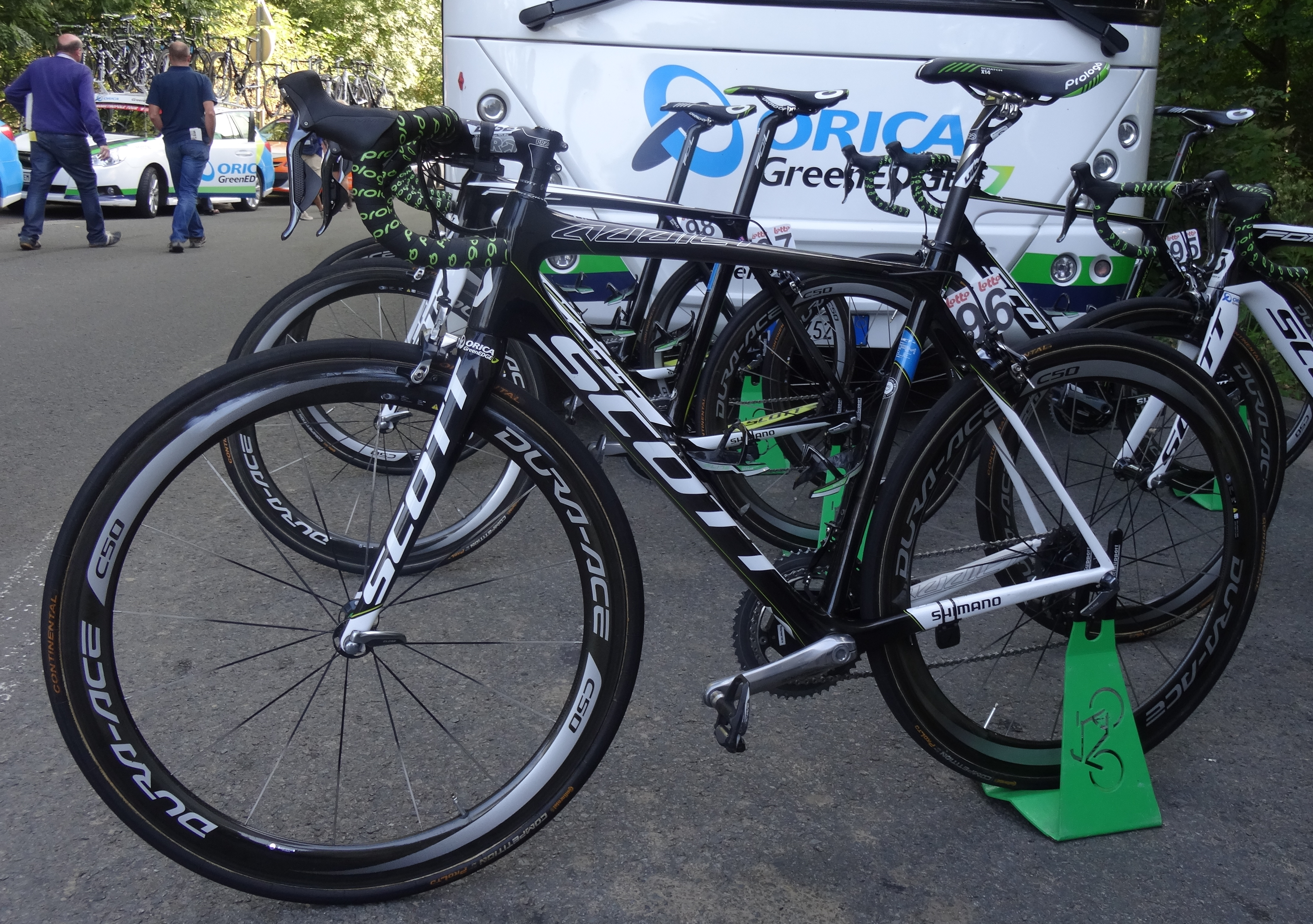 Reportage photographique réalisé le vendredi 3 octobre à l'occasion du départ de la deuxième étape de l'Eurométropole Tour 2014 à Estaimbourg (Estaimpuis), Belgique.